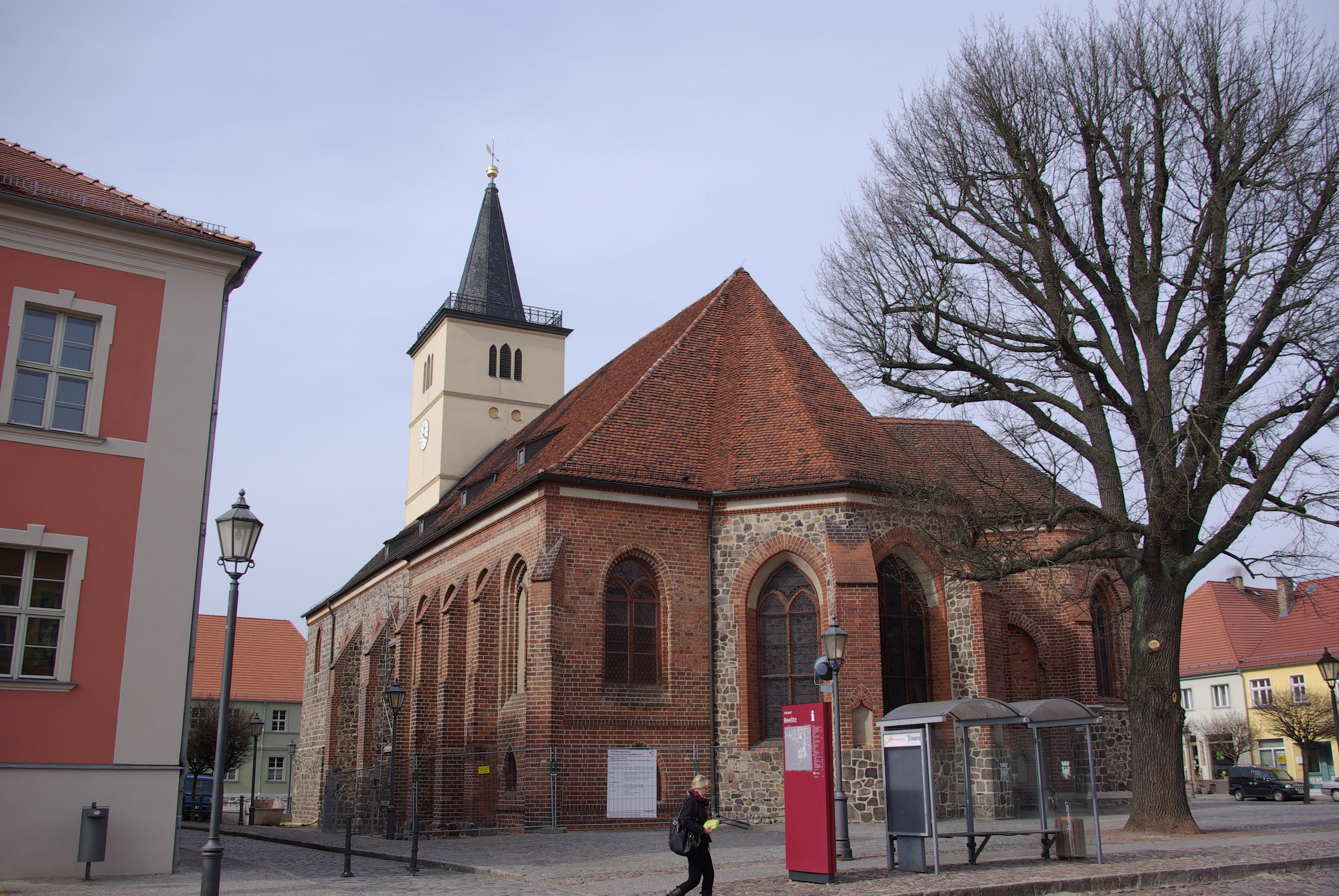 Beeltiz in Brandenburg. Die Kirche in Beelitz steht unter Denkmalschutz.